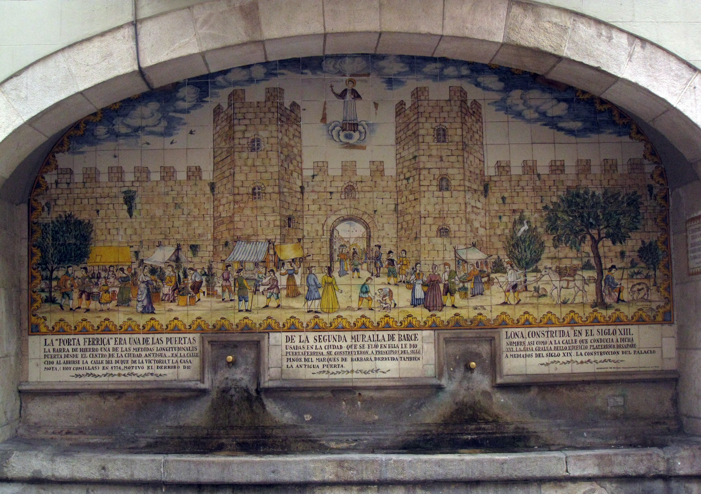 Casa Josefa Nadal, font de la Portaferrissa (Barcelona)